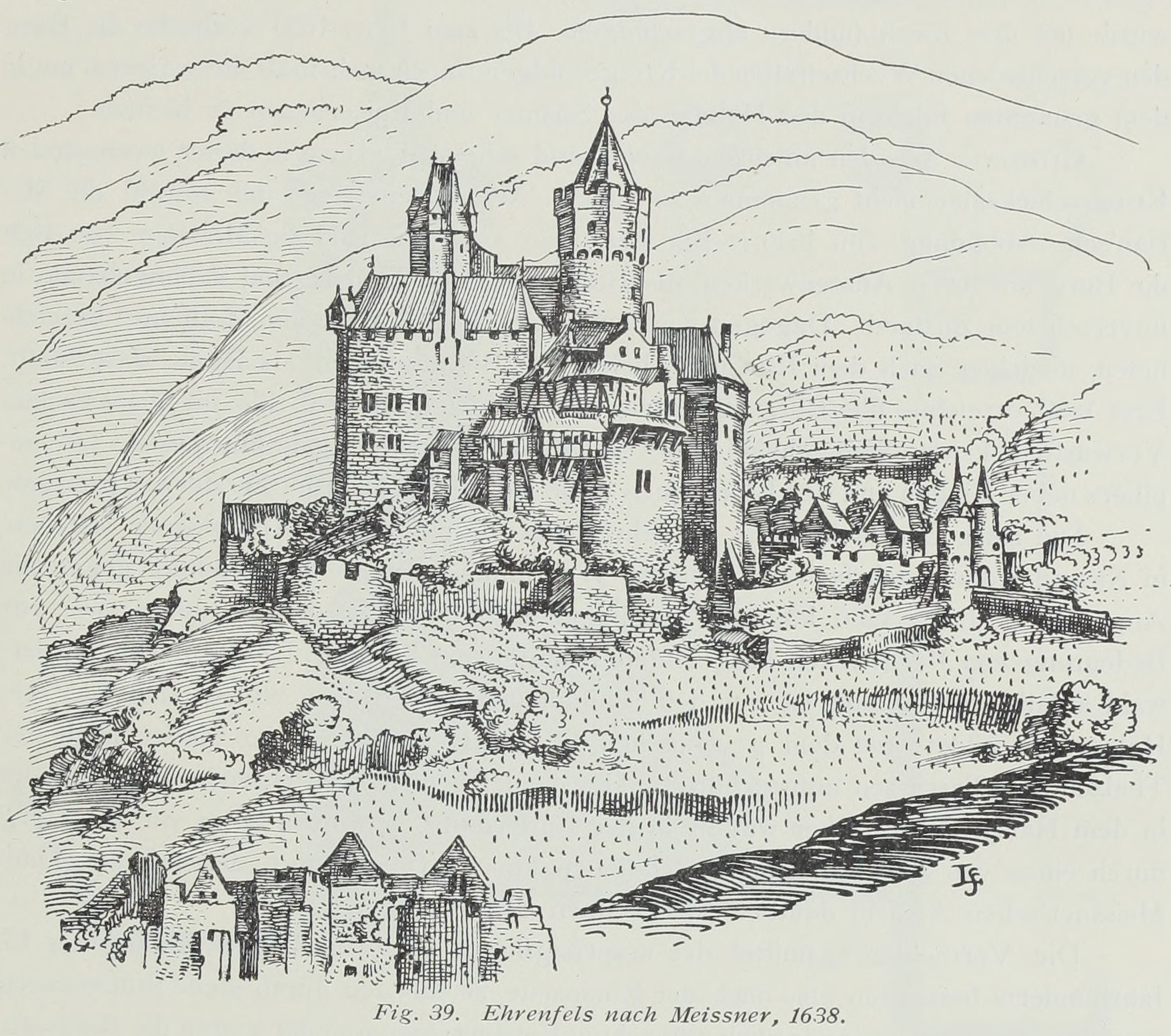 Ehrenfels nach Meissner 1638